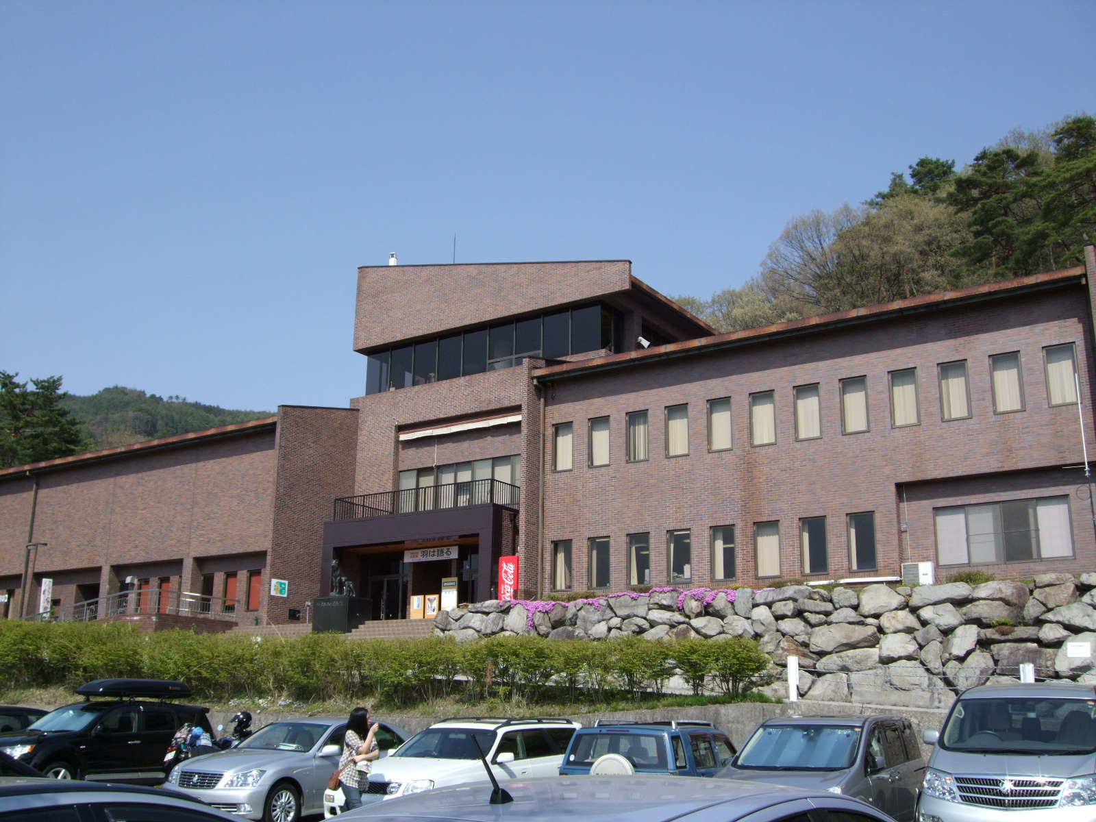 長野県大町市の大町山岳博物館